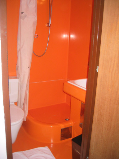 Badezimmer der 1970er Jahre in einem Hotel in Innsbruck, Österreich (vermutlich errichtet zu den Olypmischen Winterspielen 1976).